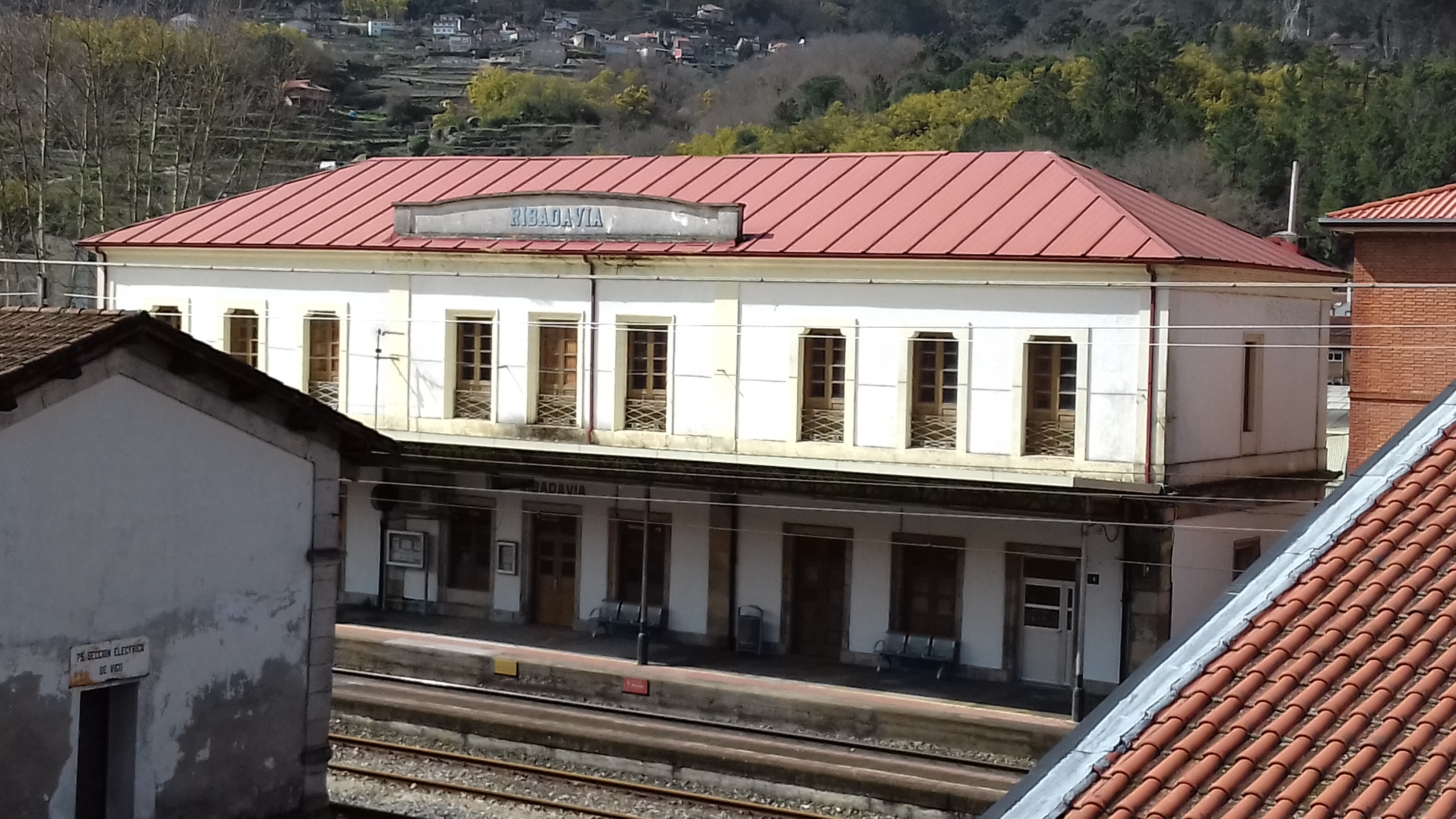 Estación de ferrocarril de Ribadavia